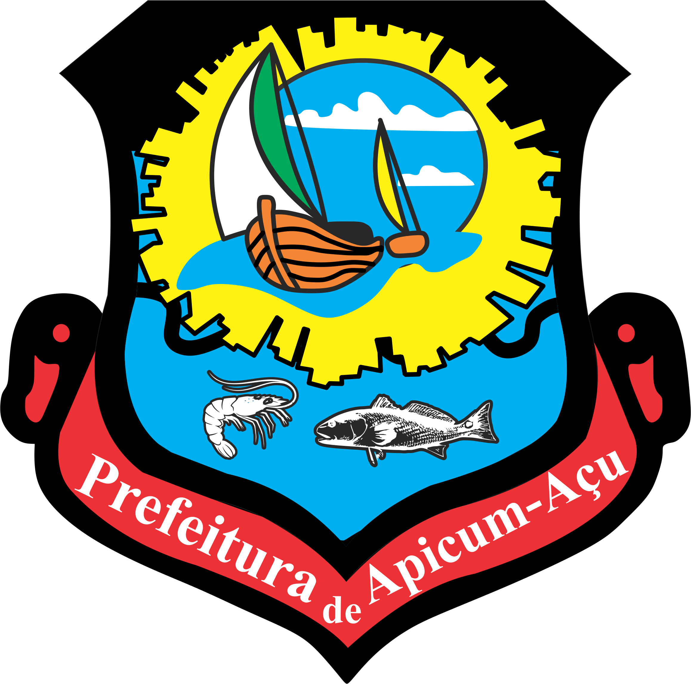 Brasão do município brasileiro de Apicum-Açu, estado do Maranhão